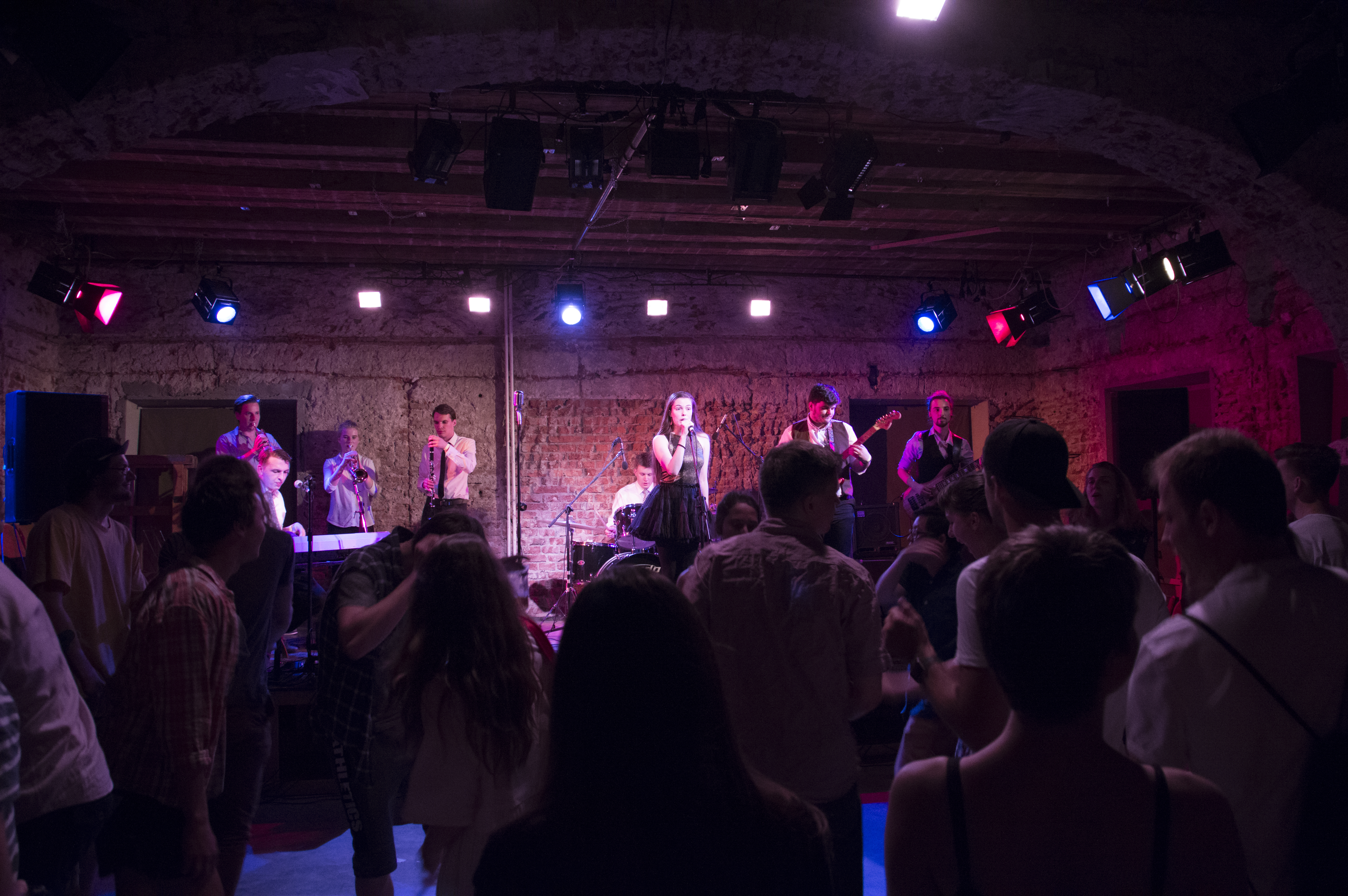 AMU párty ve Vile Štvanici (2018).